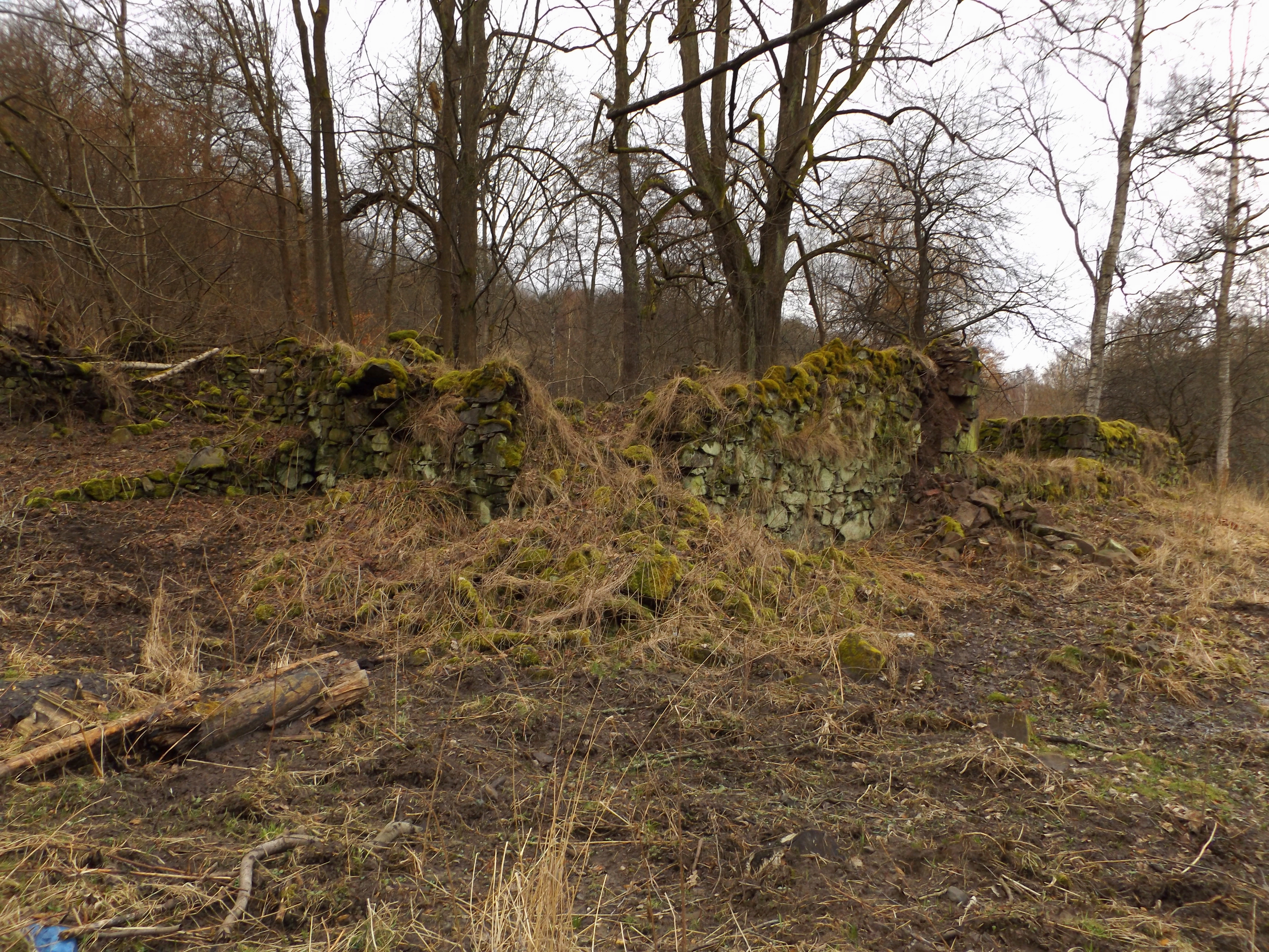 Pozůstatky zaniklého mlýna Radmühle u bývalého Telcova